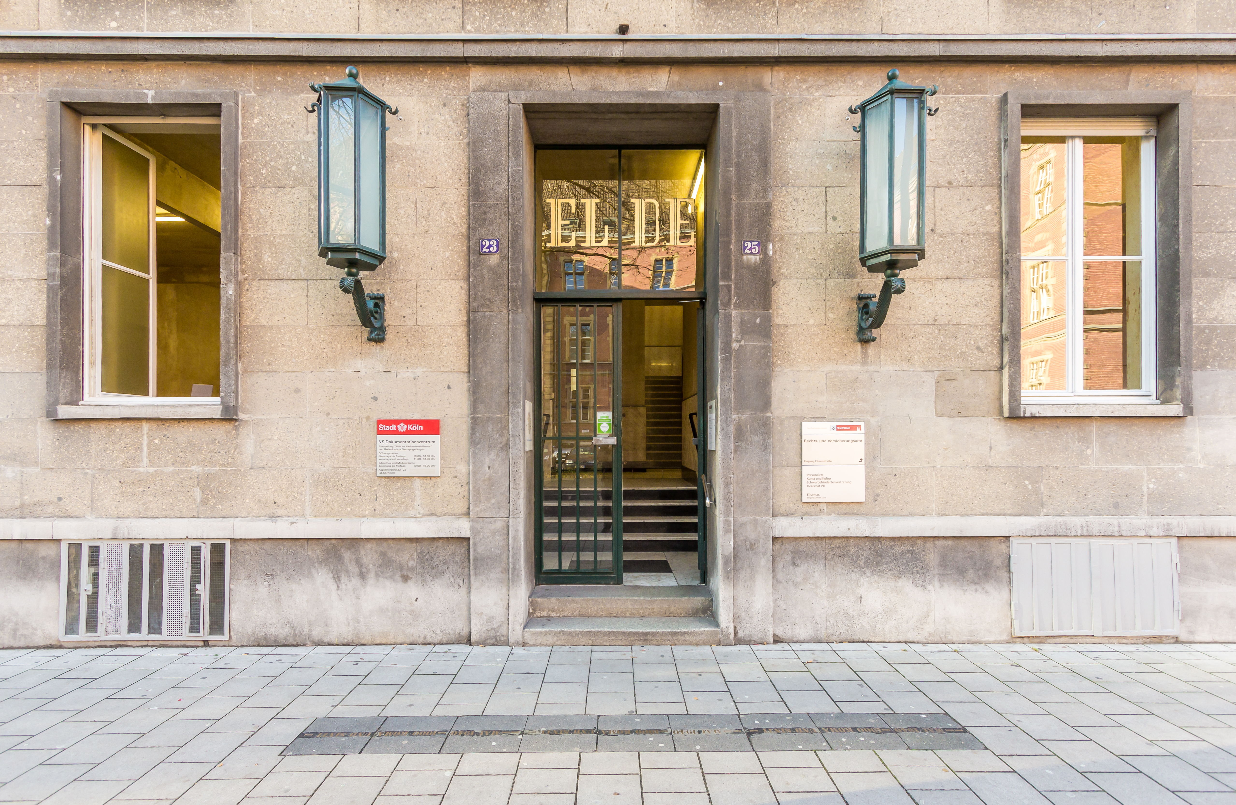 Eingang EL-DE-Haus mit dem NS-Dokumentationszentrum der Stadt Köln. Im Vordergrund die „Spur der Erinnerung“ von Gunter Demnig: „Mai 1940 – 1000 Roma und Sinti“ This is a photograph of an architectural monument.